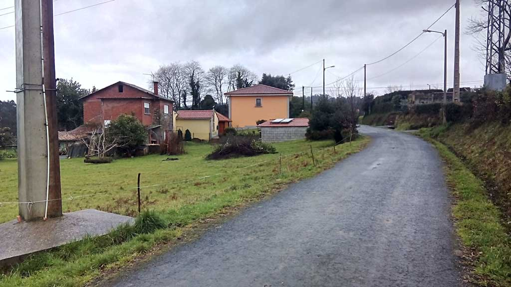 Vista das Congostras, Pedroso, Narón.